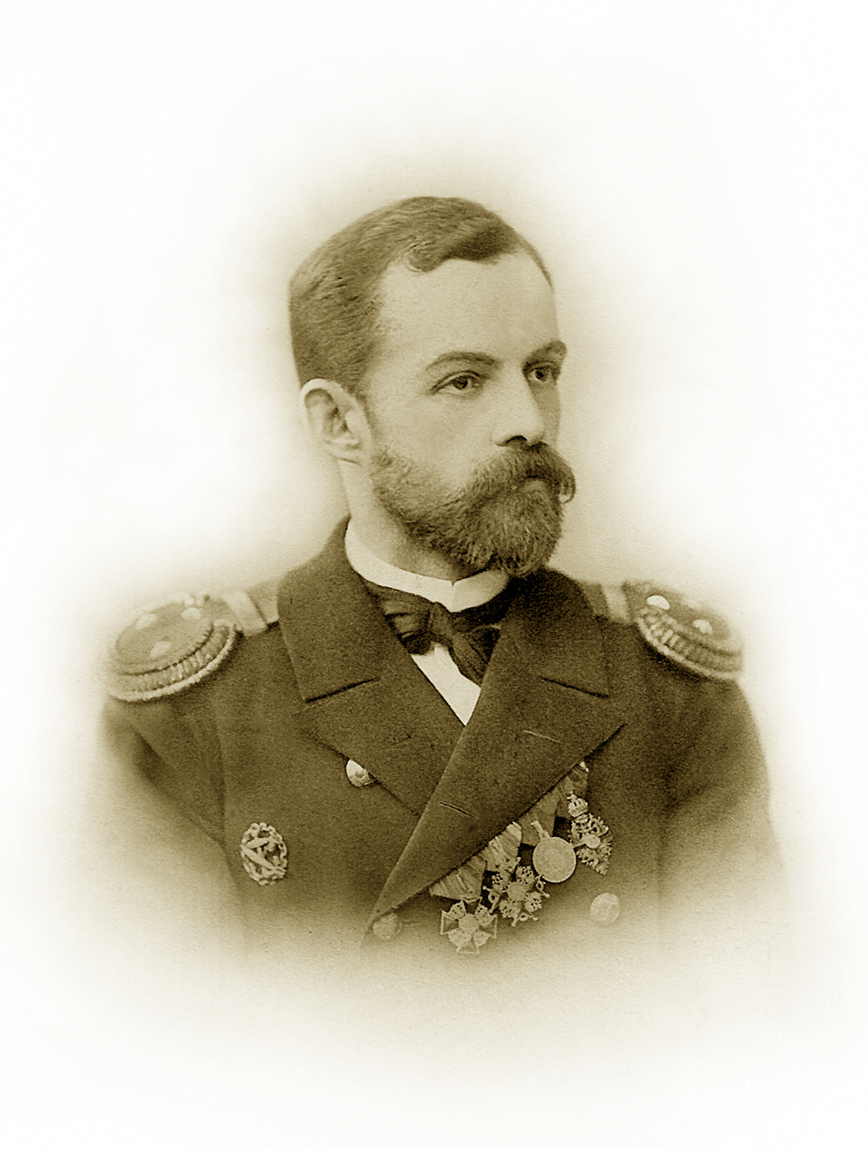 Фото Людвига Бернгардовича Кербера (1863-1919) - умершего в Англии. Фото из архива Г. Копытова, потомка адмирала. Снимок сделан, предположительно, в 1909 году: Чин/звание: «Bице-адмирал» русского флота Знаки различия на картине: погоны «Контр-адмирал».